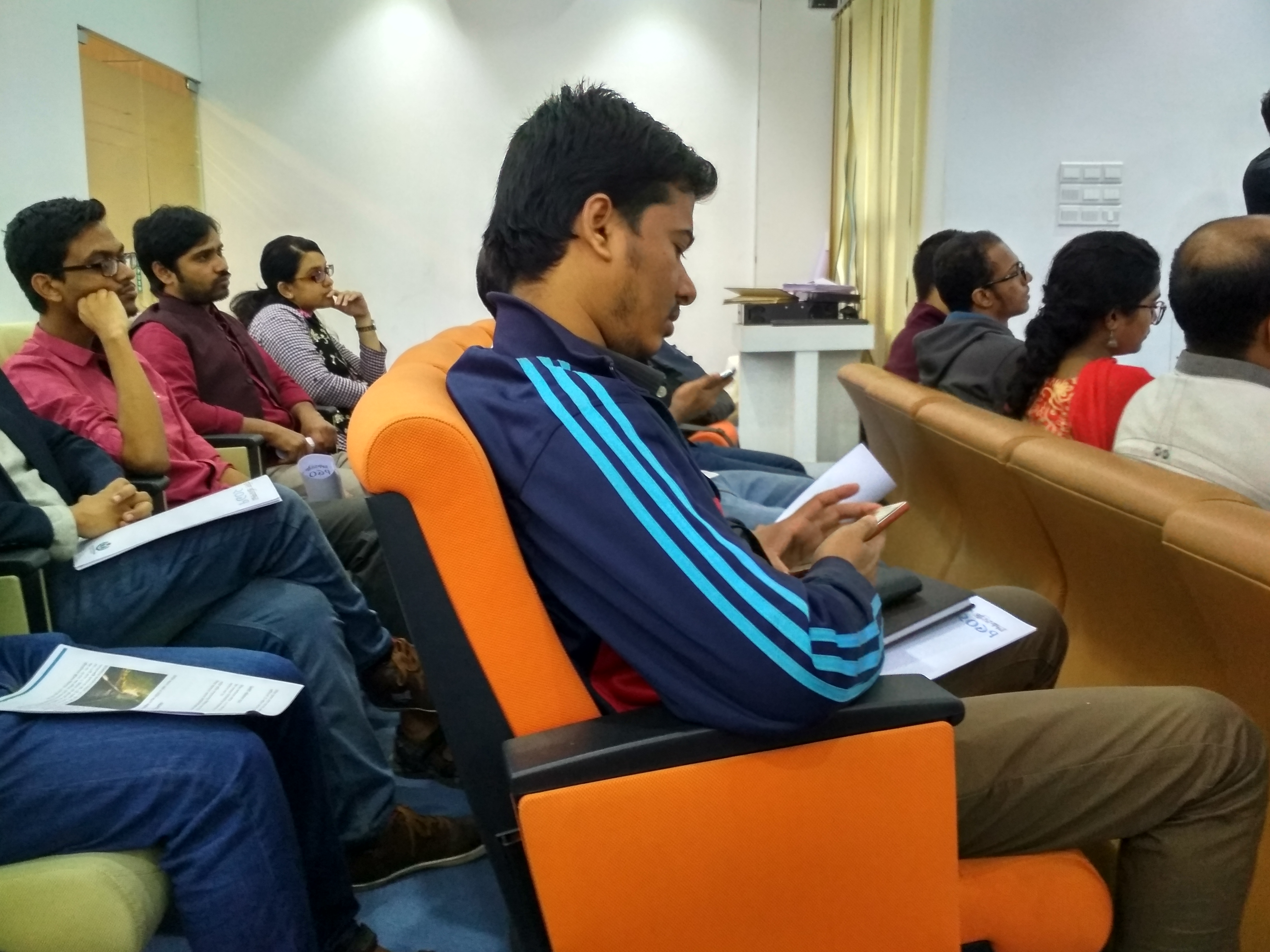 14th Anniversary of Bengali Wikipedia, Dhaka